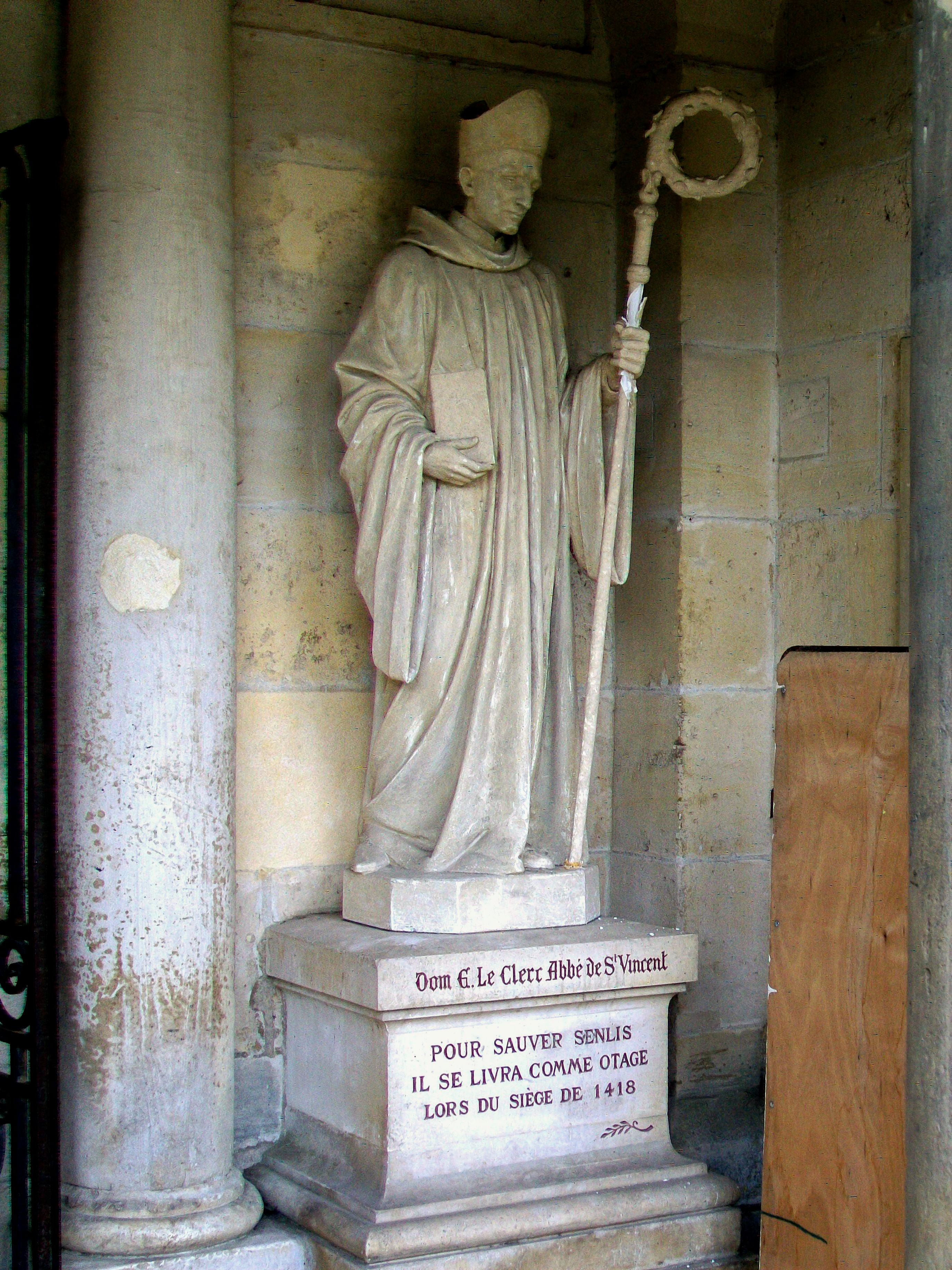 Statue de dom E. Leclerc, abbé de Saint-Vincent qui se sacrifia comme ôtage pendant le siège de 1418 pour sauver la ville de Senlis, à droite du portail.